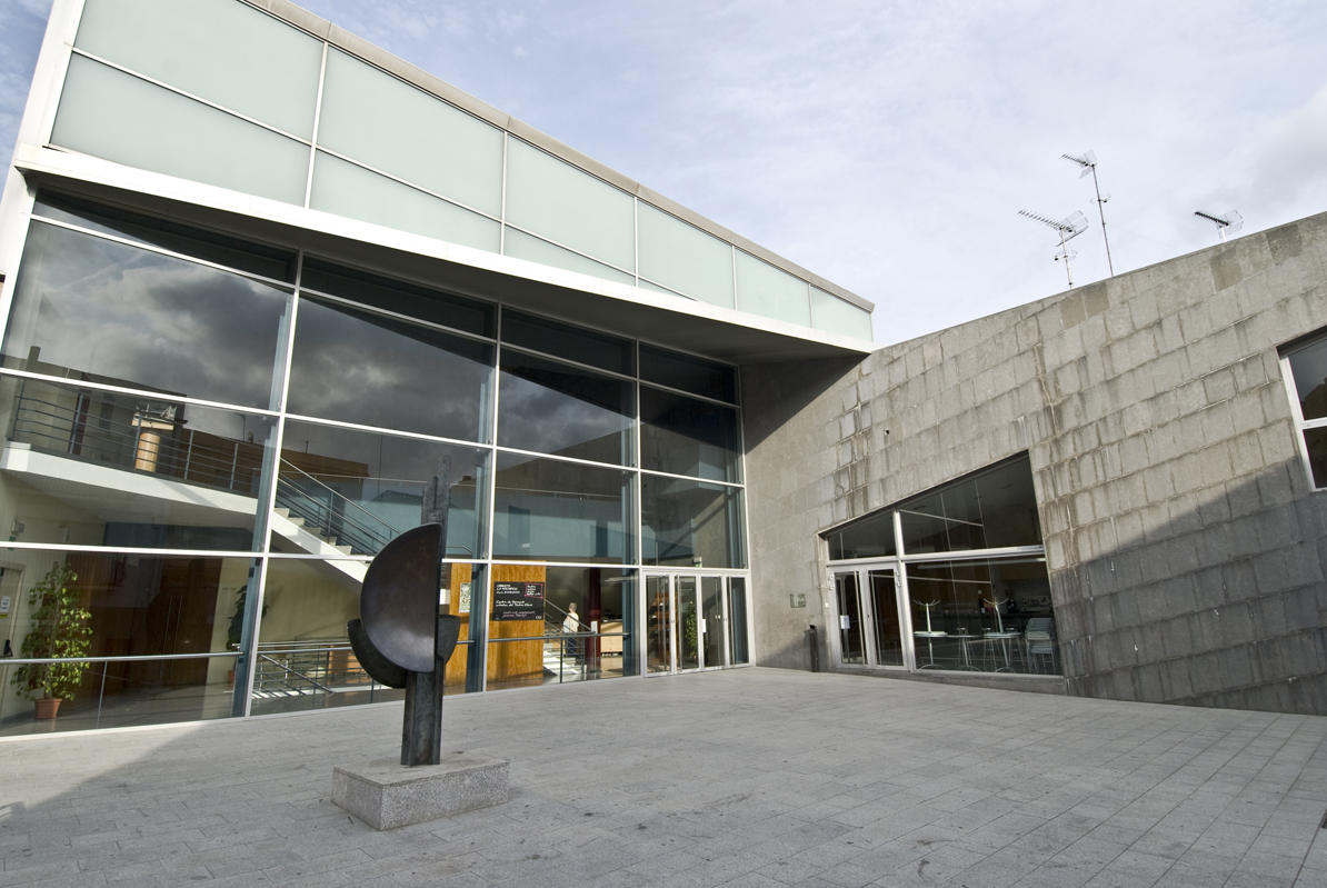 Imatge exterior del Teatre Clavé (Tordera).